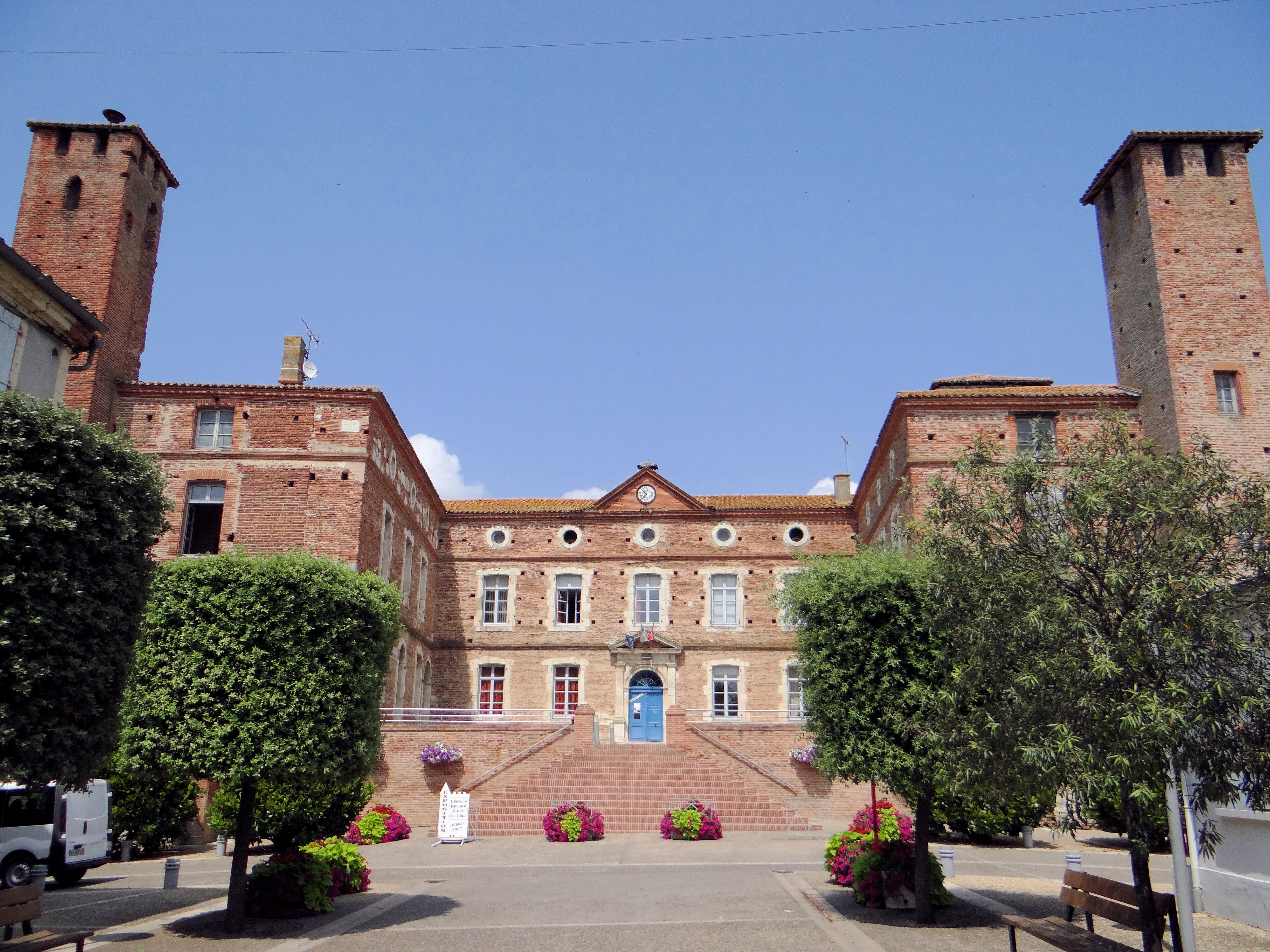 Saint-Nicolas-de-la-Grave - Château de Richard Cœur de Lion - Entrée .